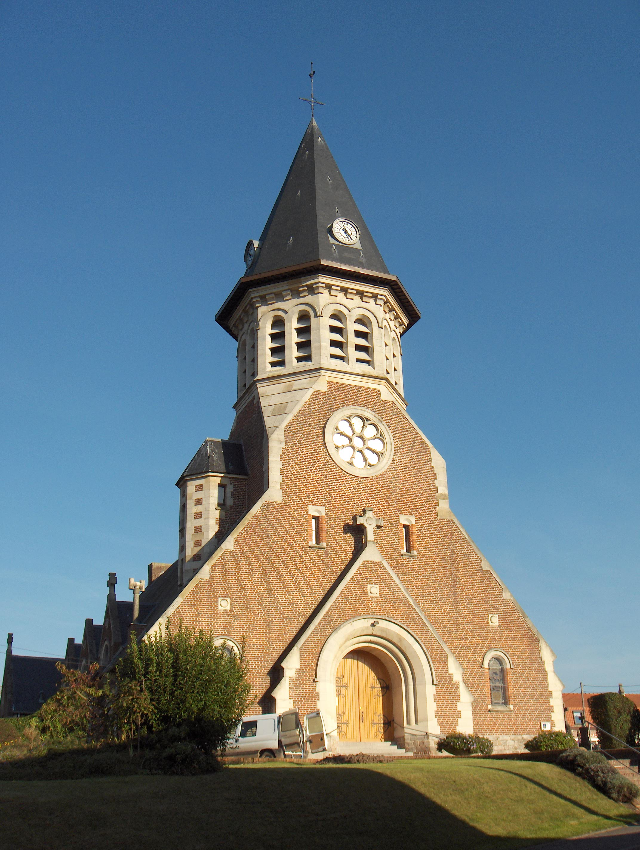 Fromelles (France, dept Nord), tour de l'église